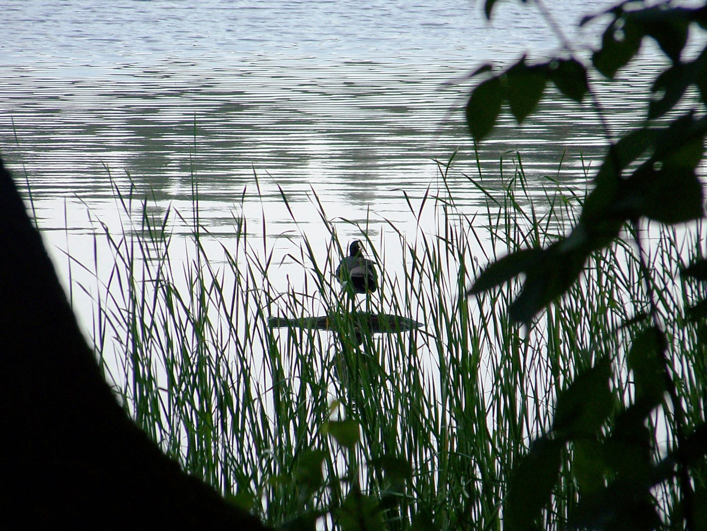 Ptactwo wodne - jezioro Głuchego, południowa część jeziora Ostrowieckiego, Drawieński Park Narodowy